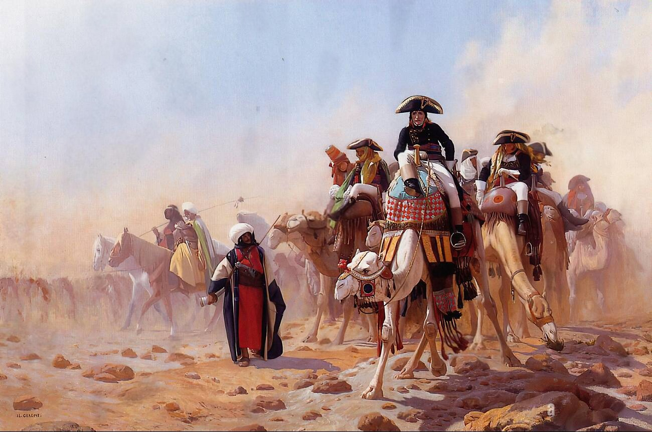 Napoléon en Egypte par Jean-Léon Gérome